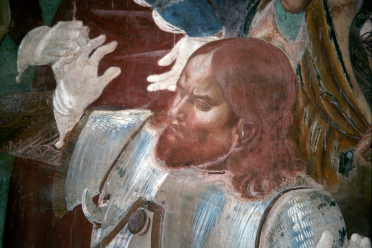 Come Benedetto discopre la finzione di Totila, by Luca Signorelli, Monte Oliveto Maggiore